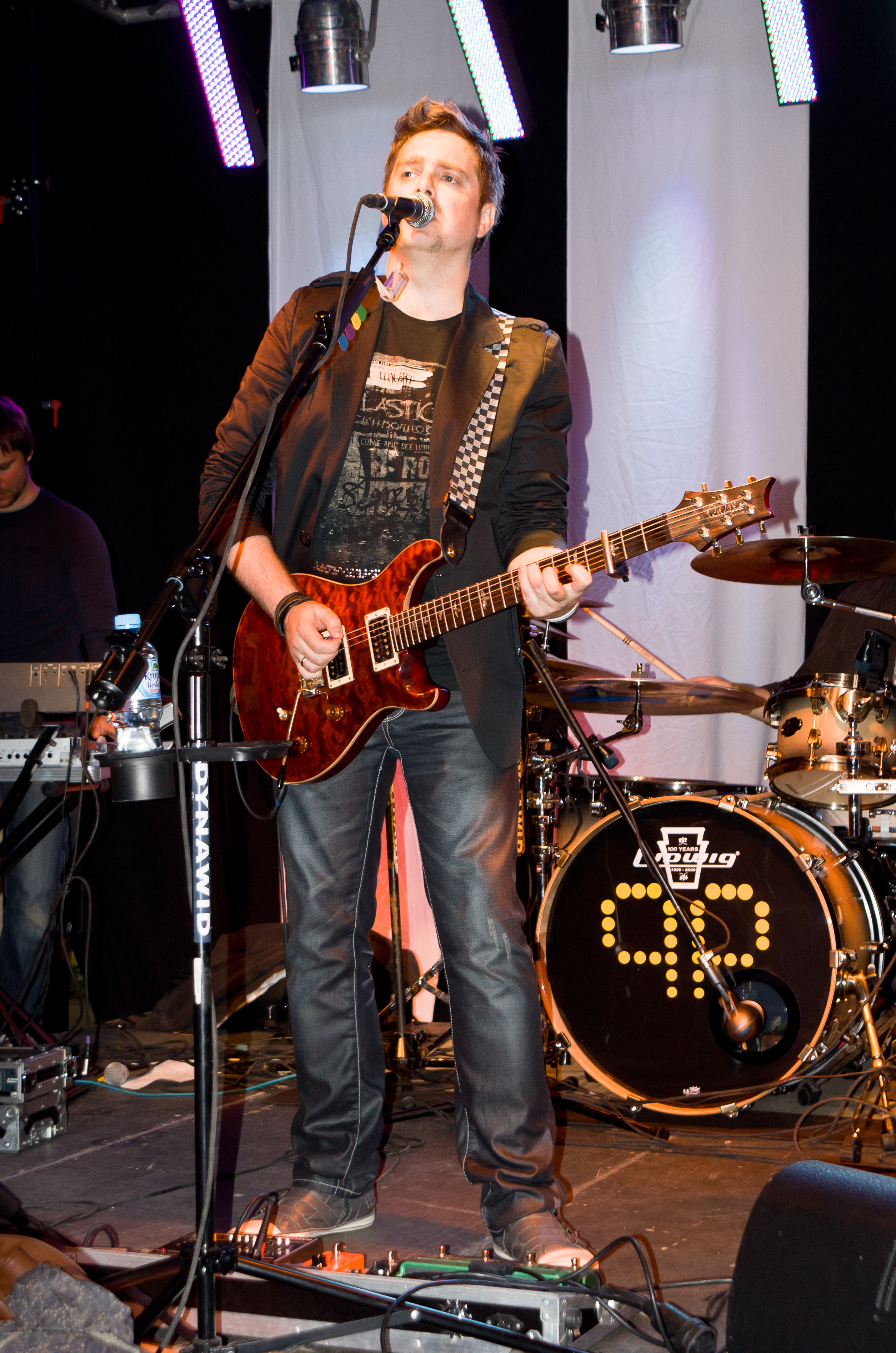 Michał Wojtas, gitarzysta i wokalista zespołu Uniqplan podczas koncertu w Galerii Jabłkowskich w Warszawie, Noc Muzeów 2011, Warszawa.